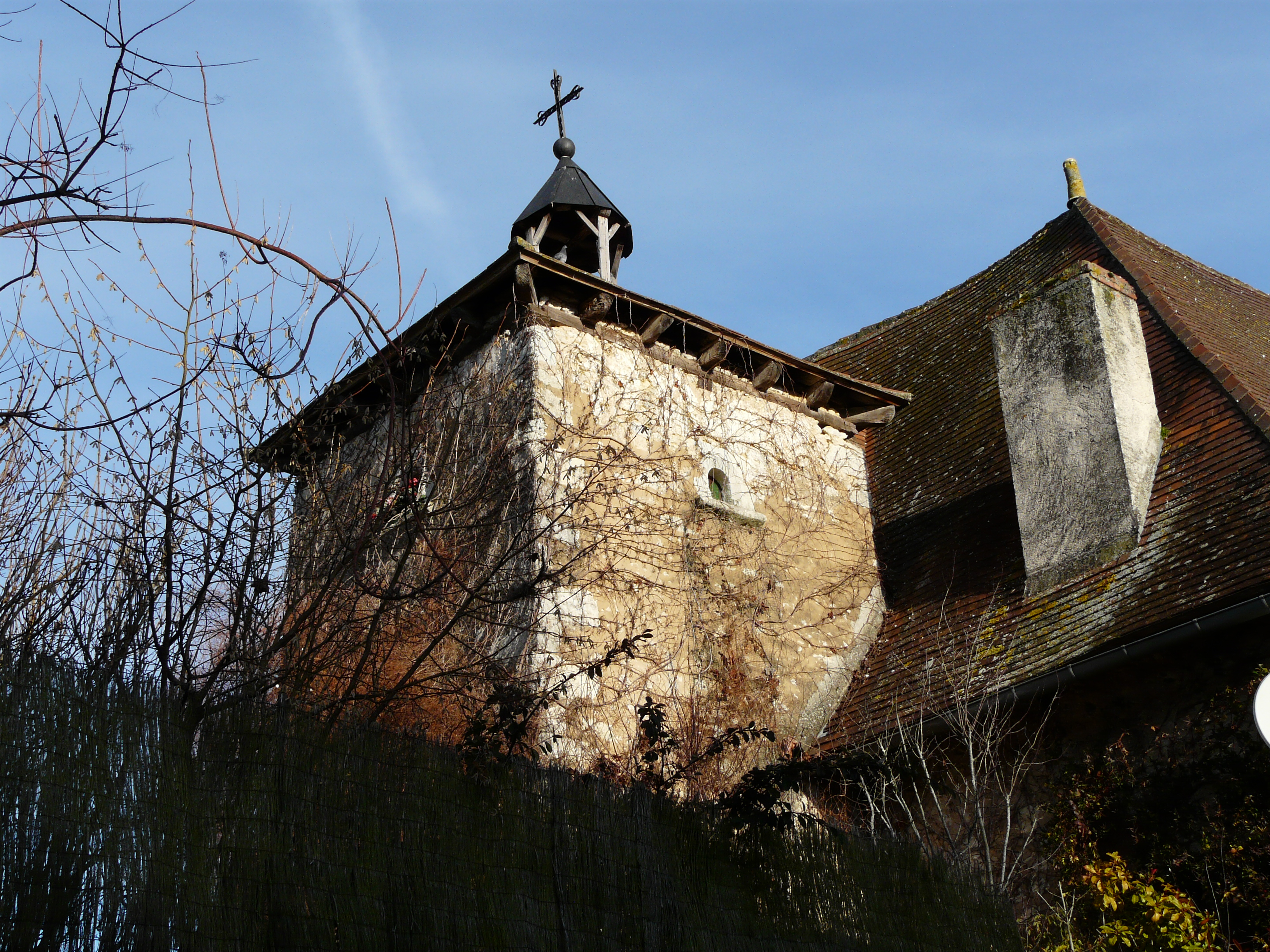 Pigeonnier du logis de l'Hospice, Agonac, Dordogne, France . Object location45° 17′ 30″ N, 0° 44′ 56″ E